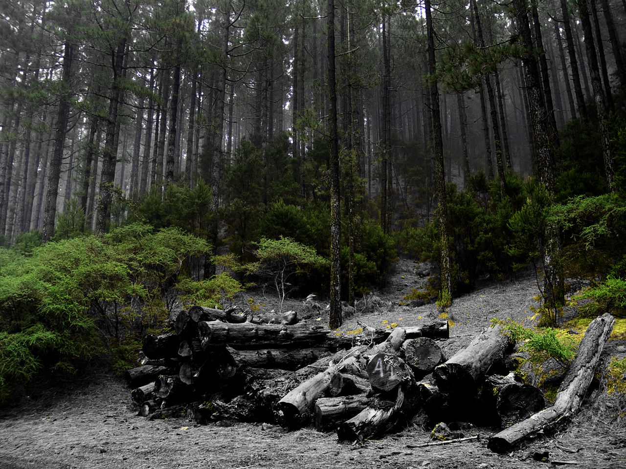 Las Lagunetas a su paso por el municipio de La Matanza de Acentejo, Tenerife.